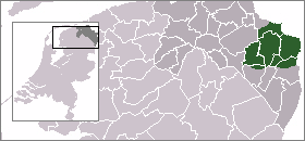 Kaart 1.